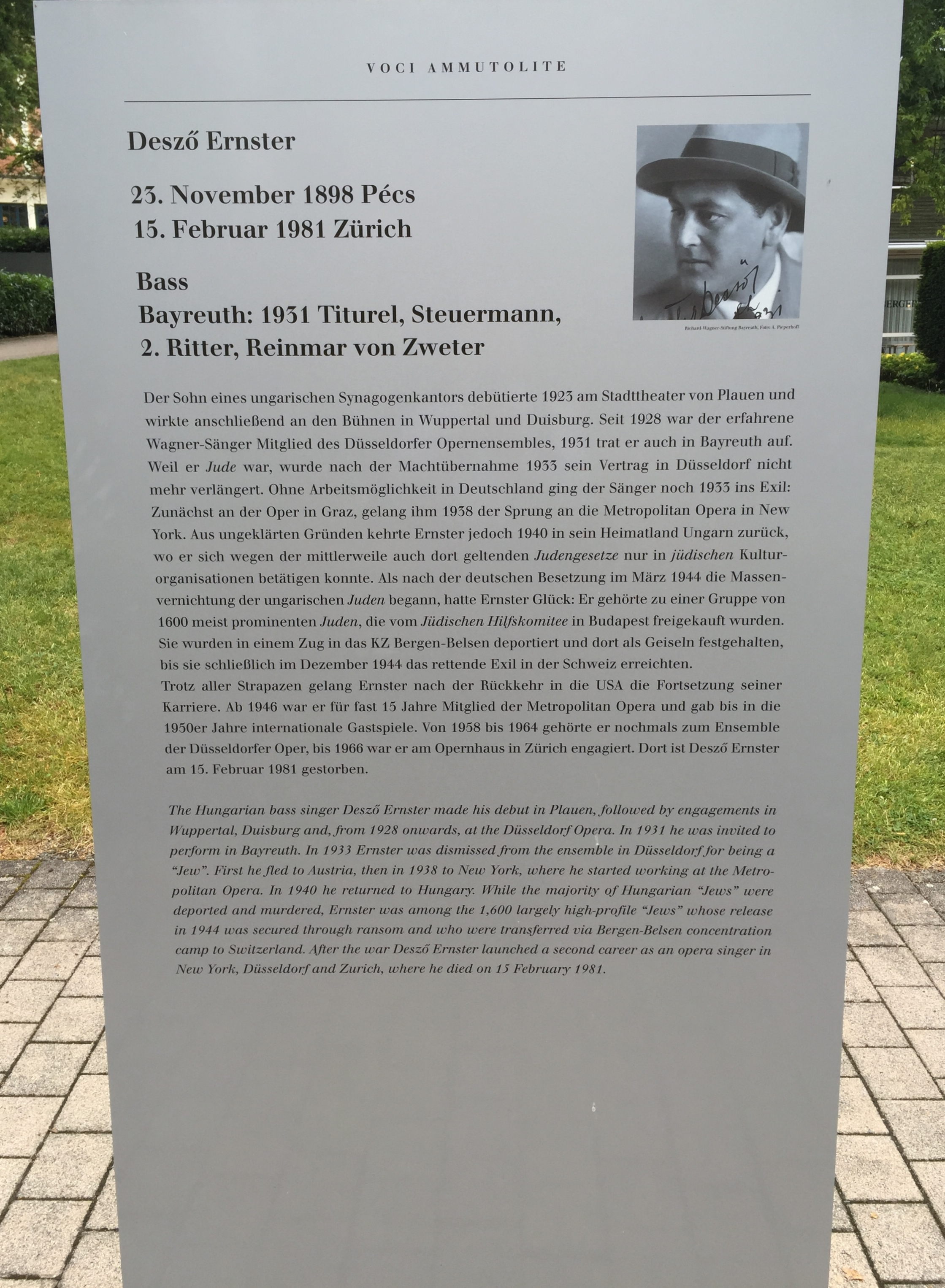 "Verstummte Stimmen - Die Bayreuther Festspiele und die 'Juden' 1876 bis 1945", Ausstellung 2016